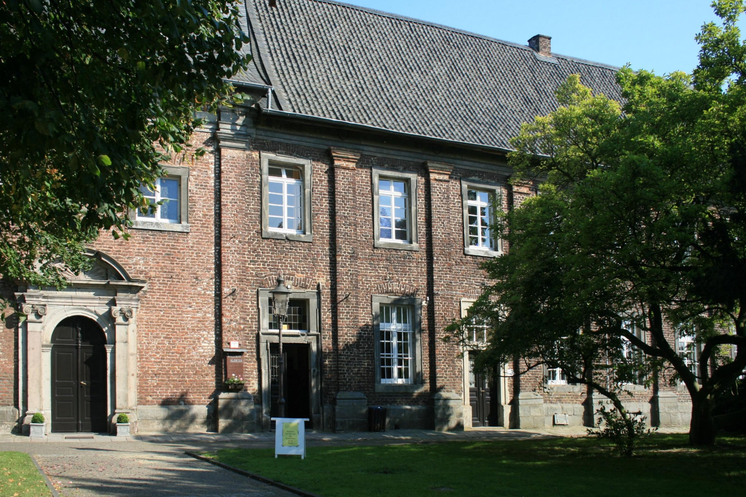 Baudenkmal in der Gemeinde Jüchen Nr. 017